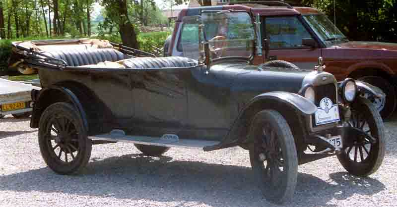 Oakland Touring 1917